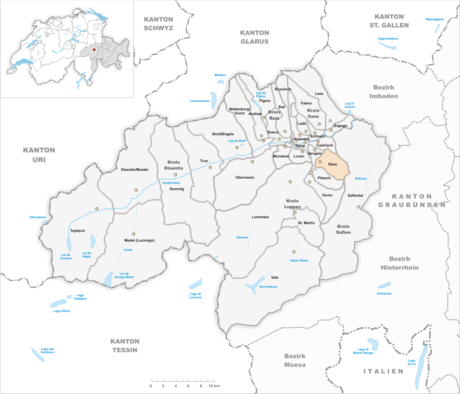 Municipality Riein